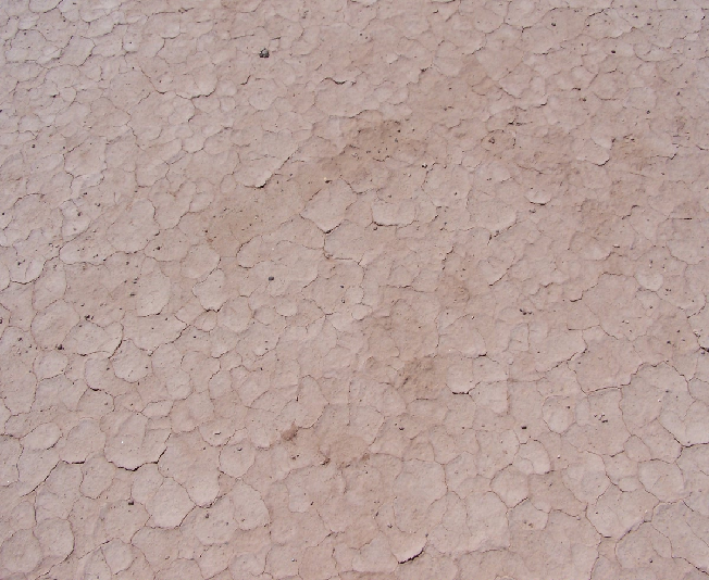 Een leemwoestijnoppervlak nabij Tinerhir, Marokko.